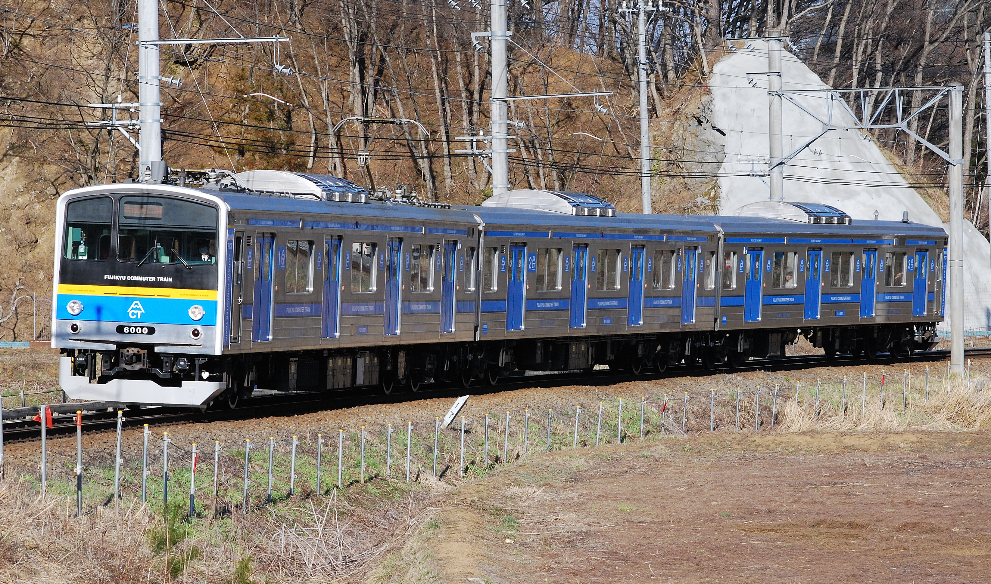 富士急行線を走行する、富士急6000系（寿～三つ峠間）